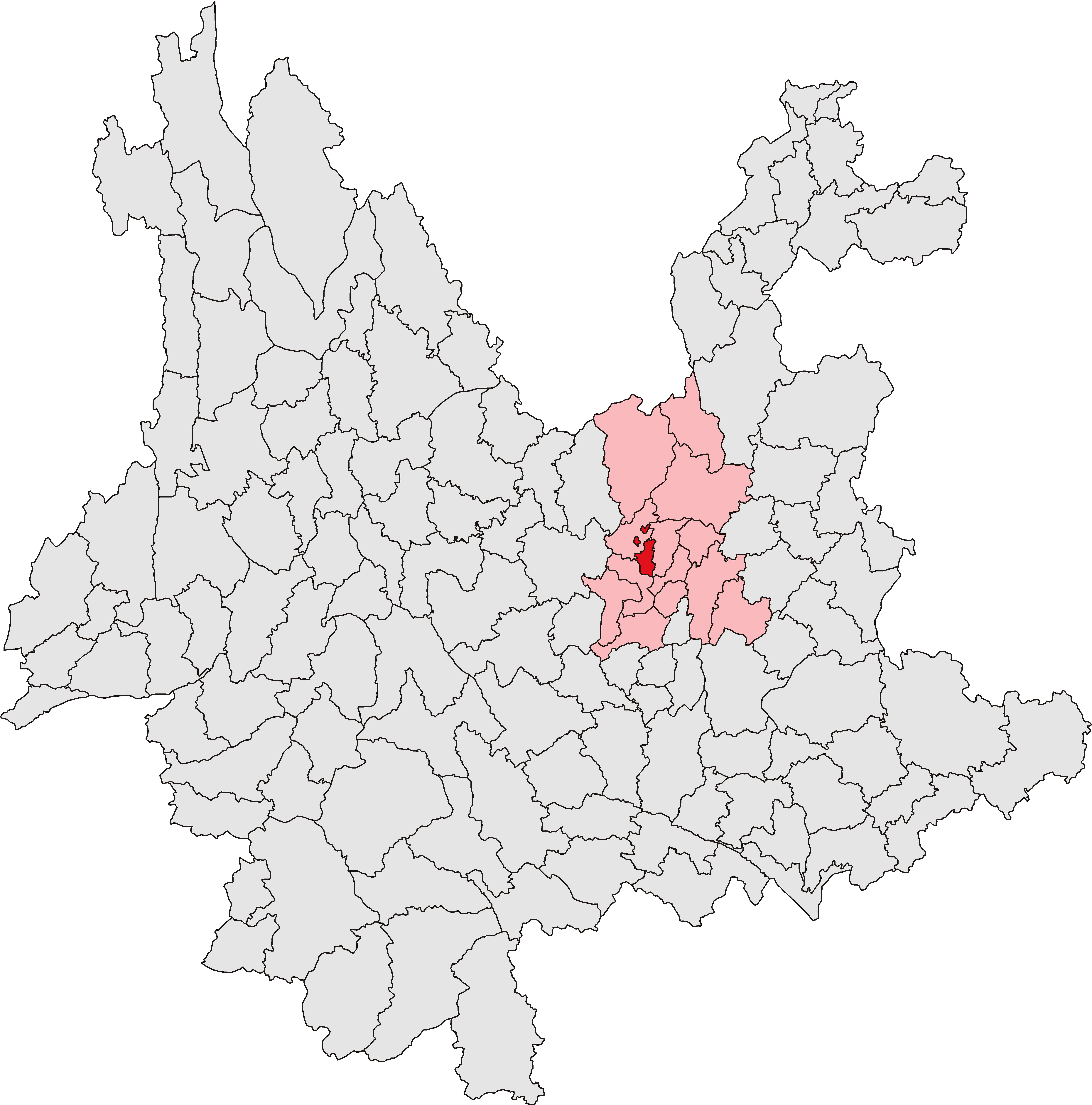 五华区位置图